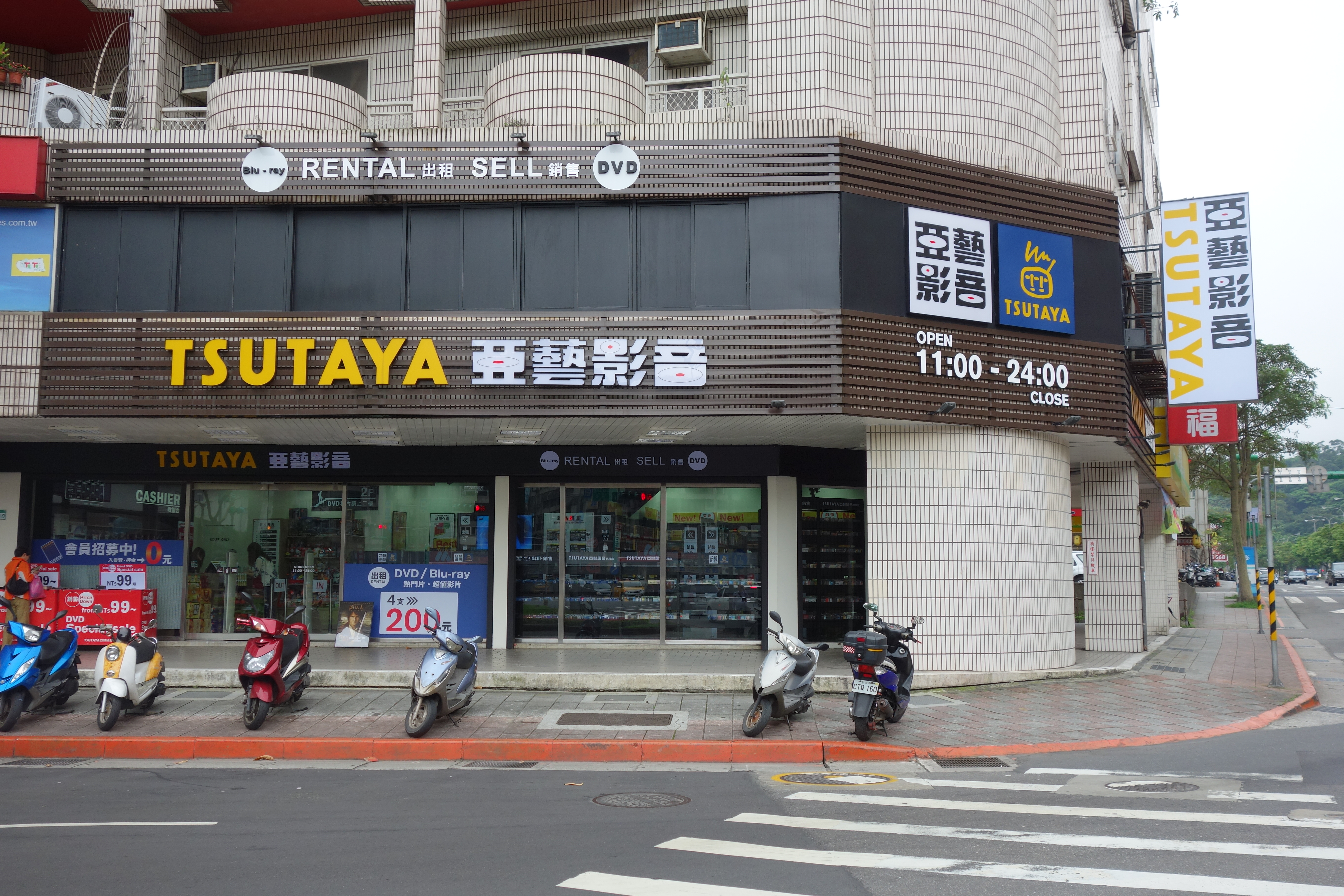 TSUTAYA亞藝影音 民権店 台湾 台北市内湖区民権東路六段300号 （2012年12月27日開業、2013年4月24日撮影）